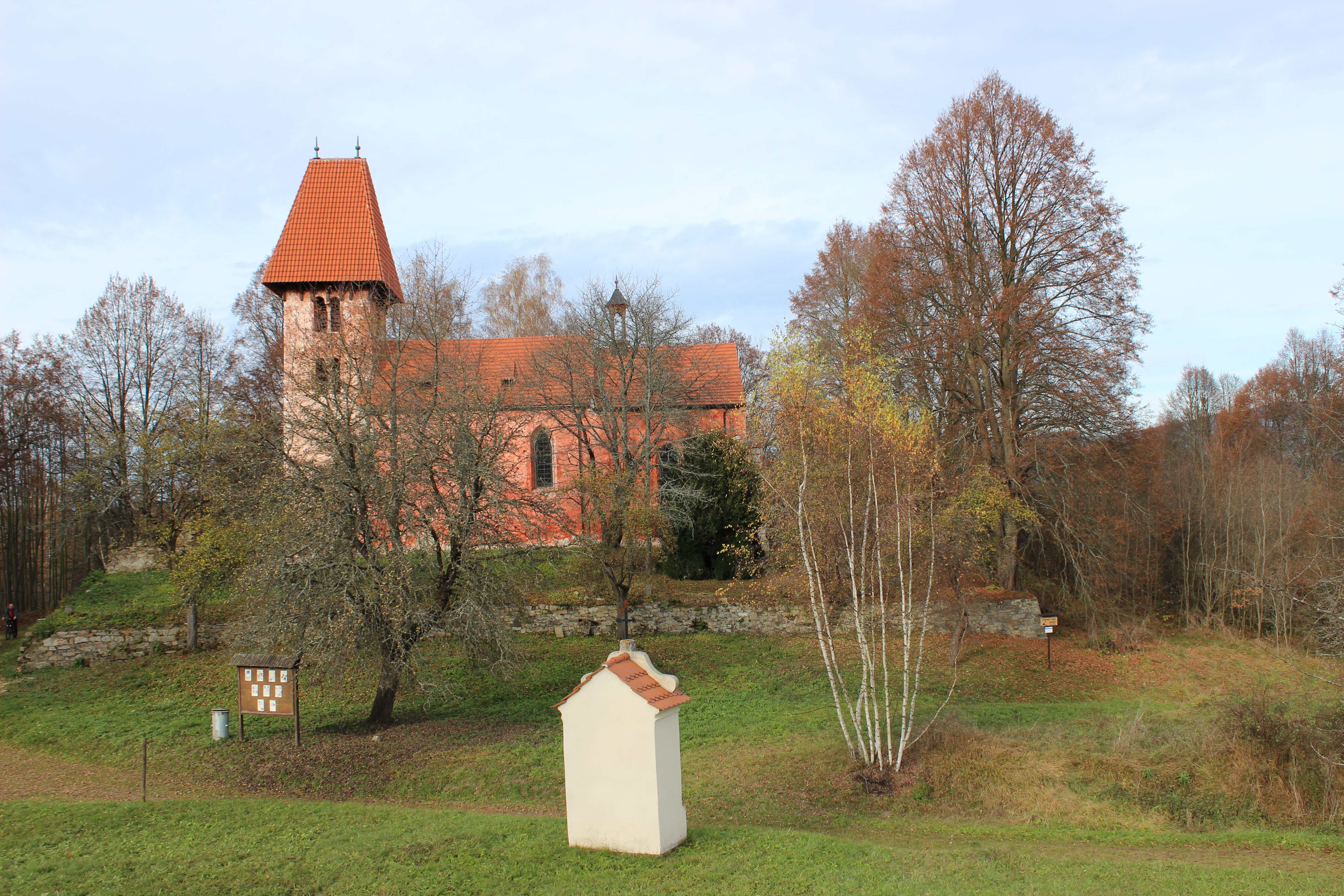 Kostel svatého Mikuláše a kaple. Boletice ve vojenském újezdu Boletice. Okres Český Krumlov. Česká republika.